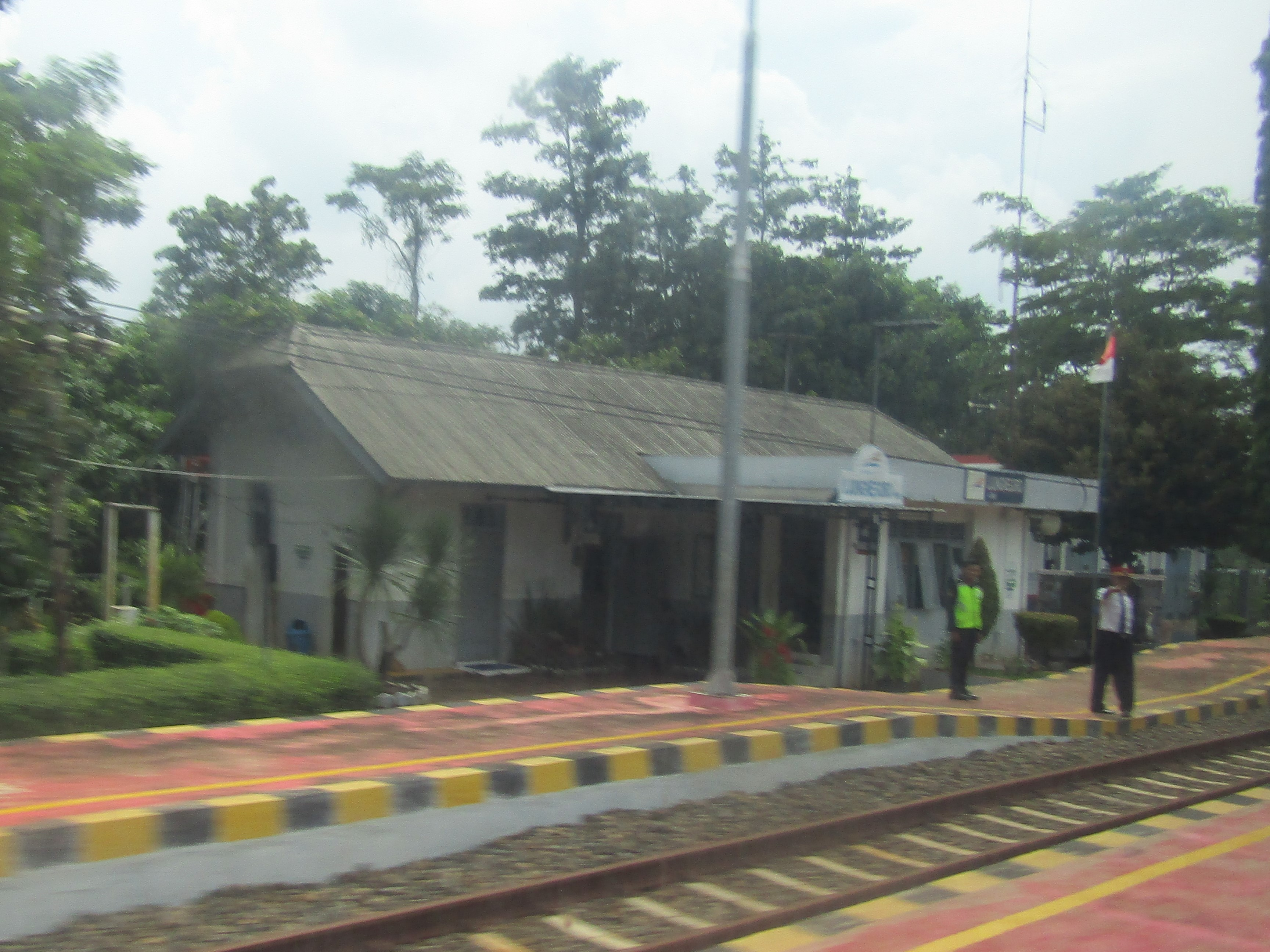 Tampak peron Stasiun Ujungnegoro, 2019